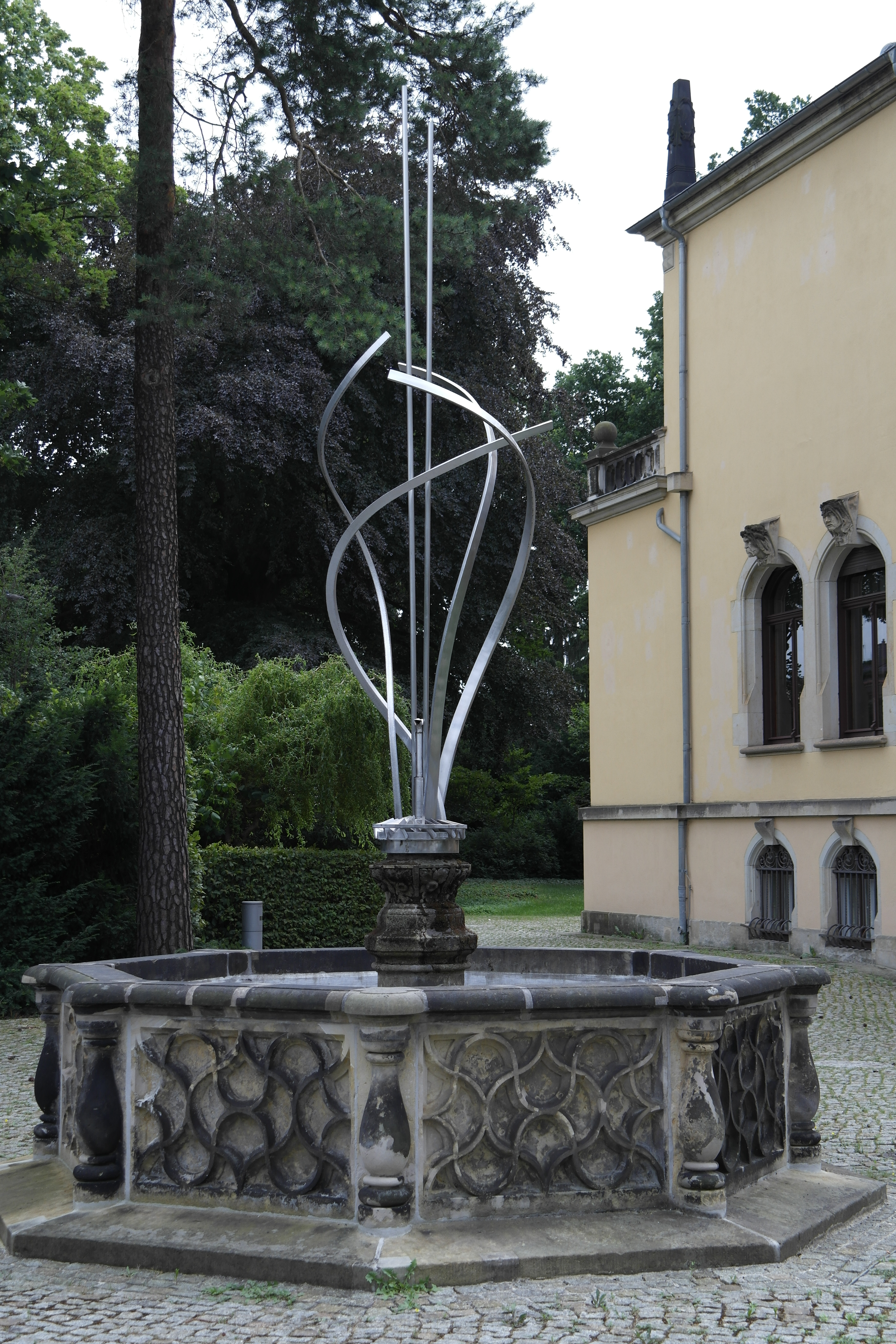 Metallskulptur "Wassermusik" von Dresdner Bildhauer und Metallgestalter Hans-Volker Mixsa